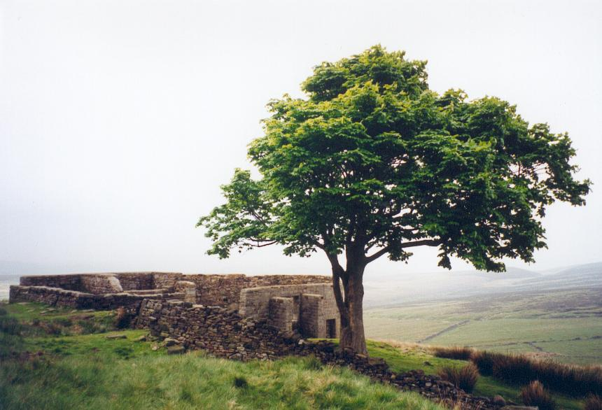 Foto von Top Withens, Stanbury, Haworth, West Yorkshire